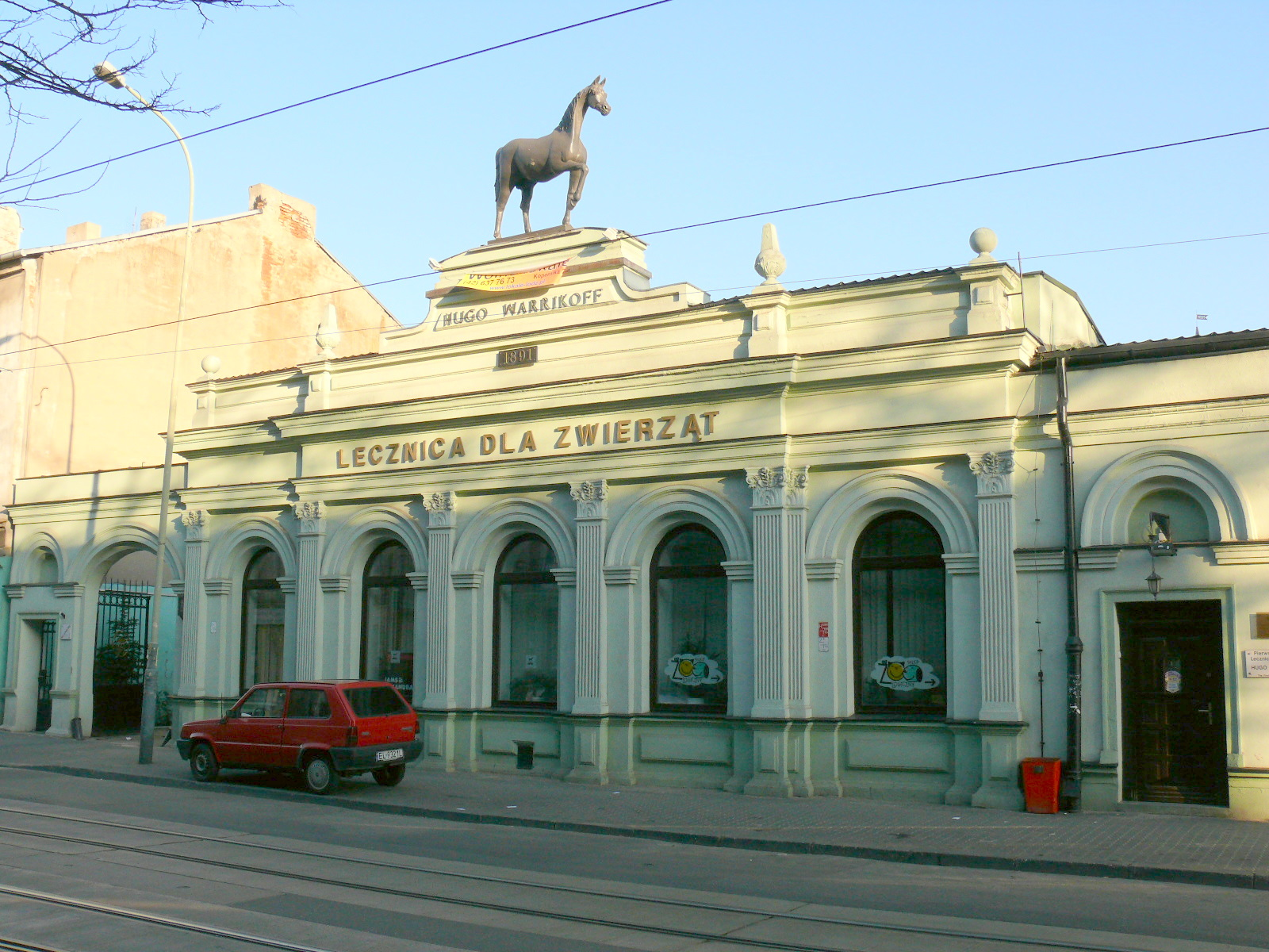 Lecznica "Pod koniem" w Łodzi